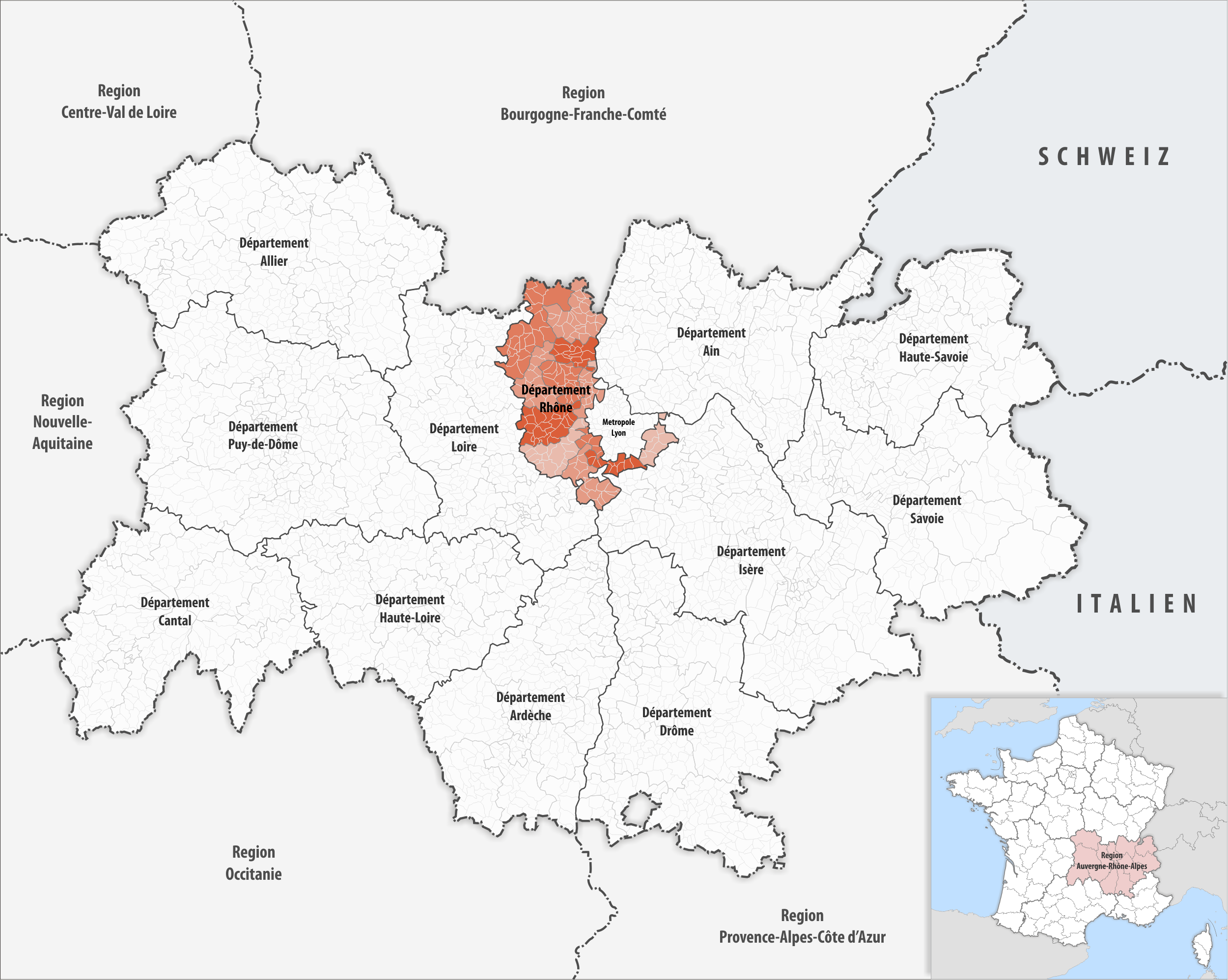 Lage des Departements Rhône